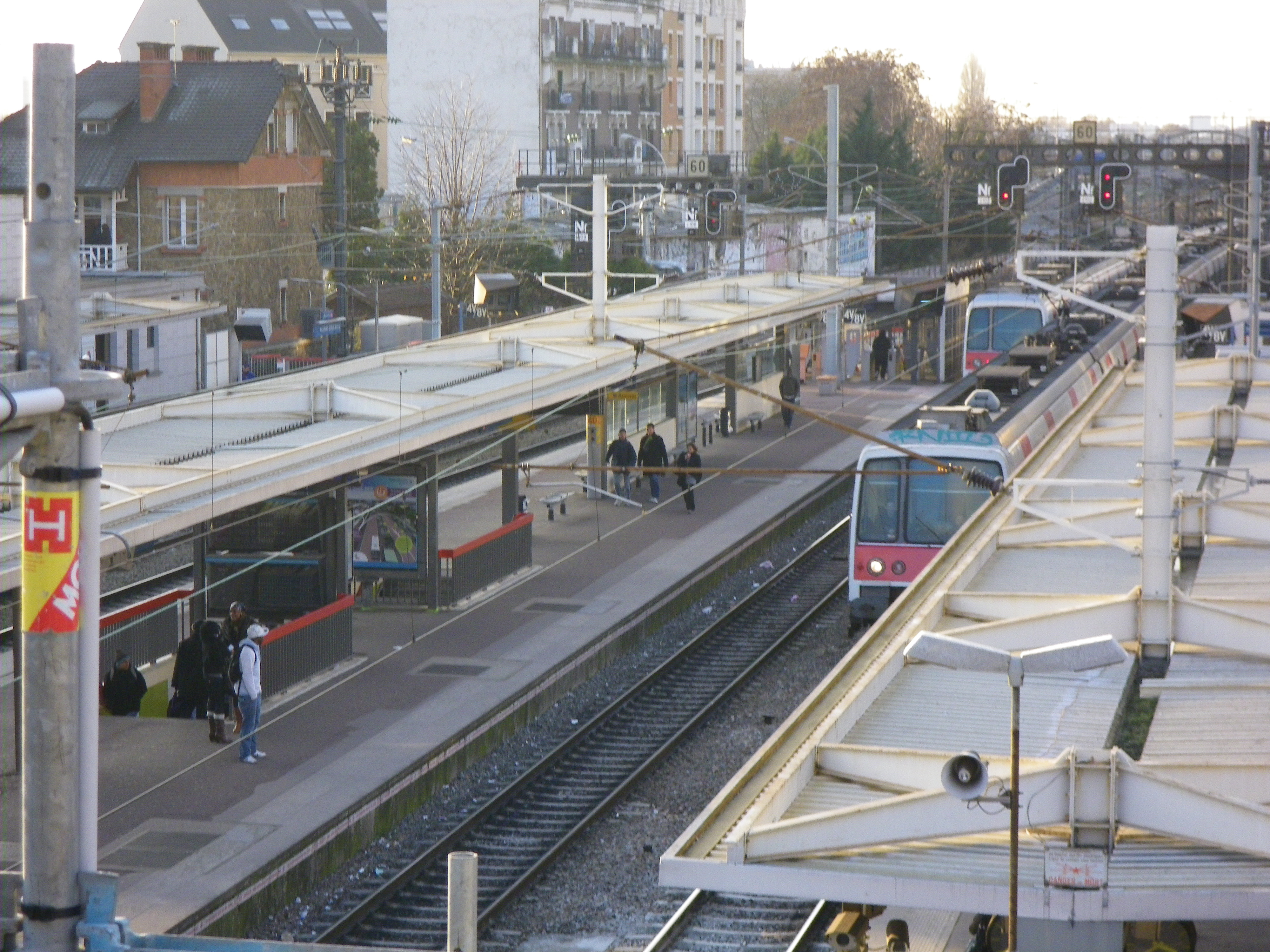 Croisement de la mission ICAR avec la mission PEPE- gare d'aulnay sous bois